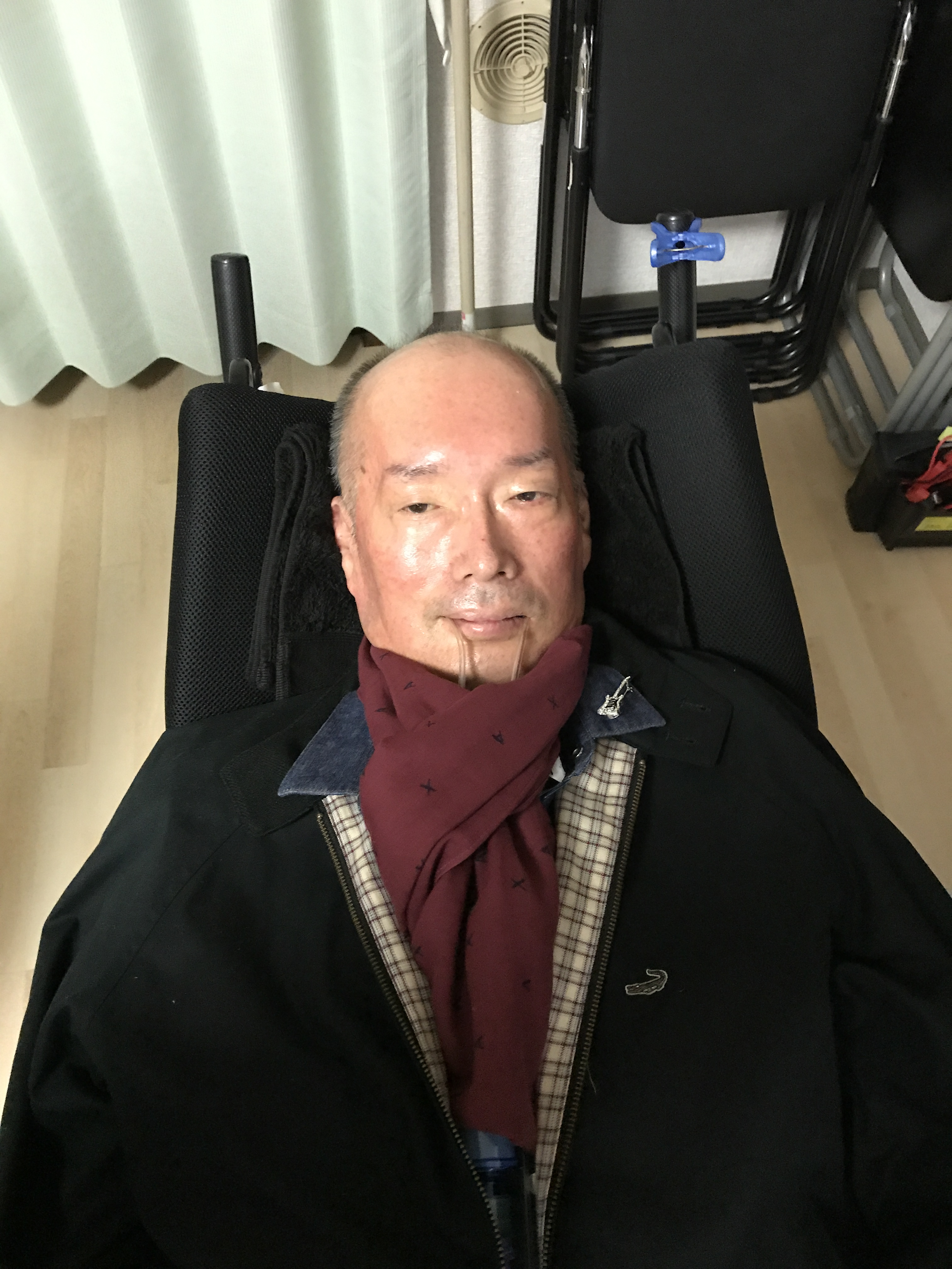 舩後靖彦2019年10月近況